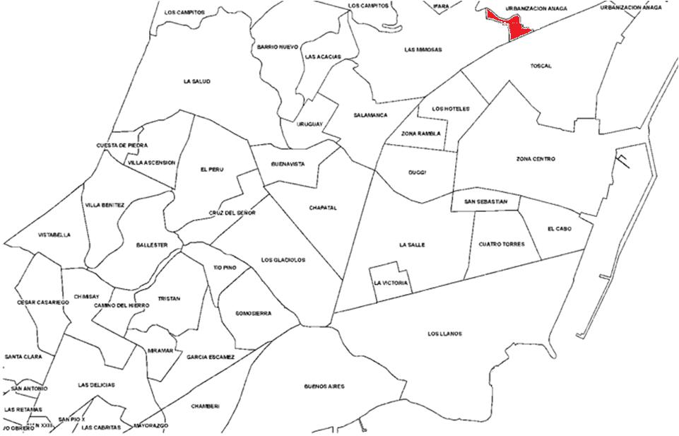 Localización del barrio